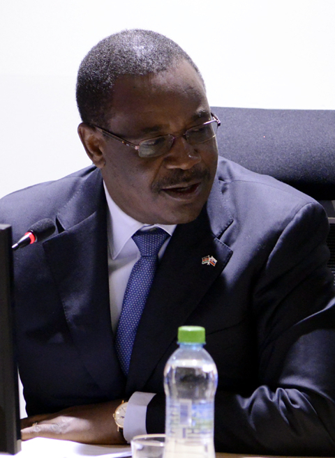 Evans Odhiambo Kidero